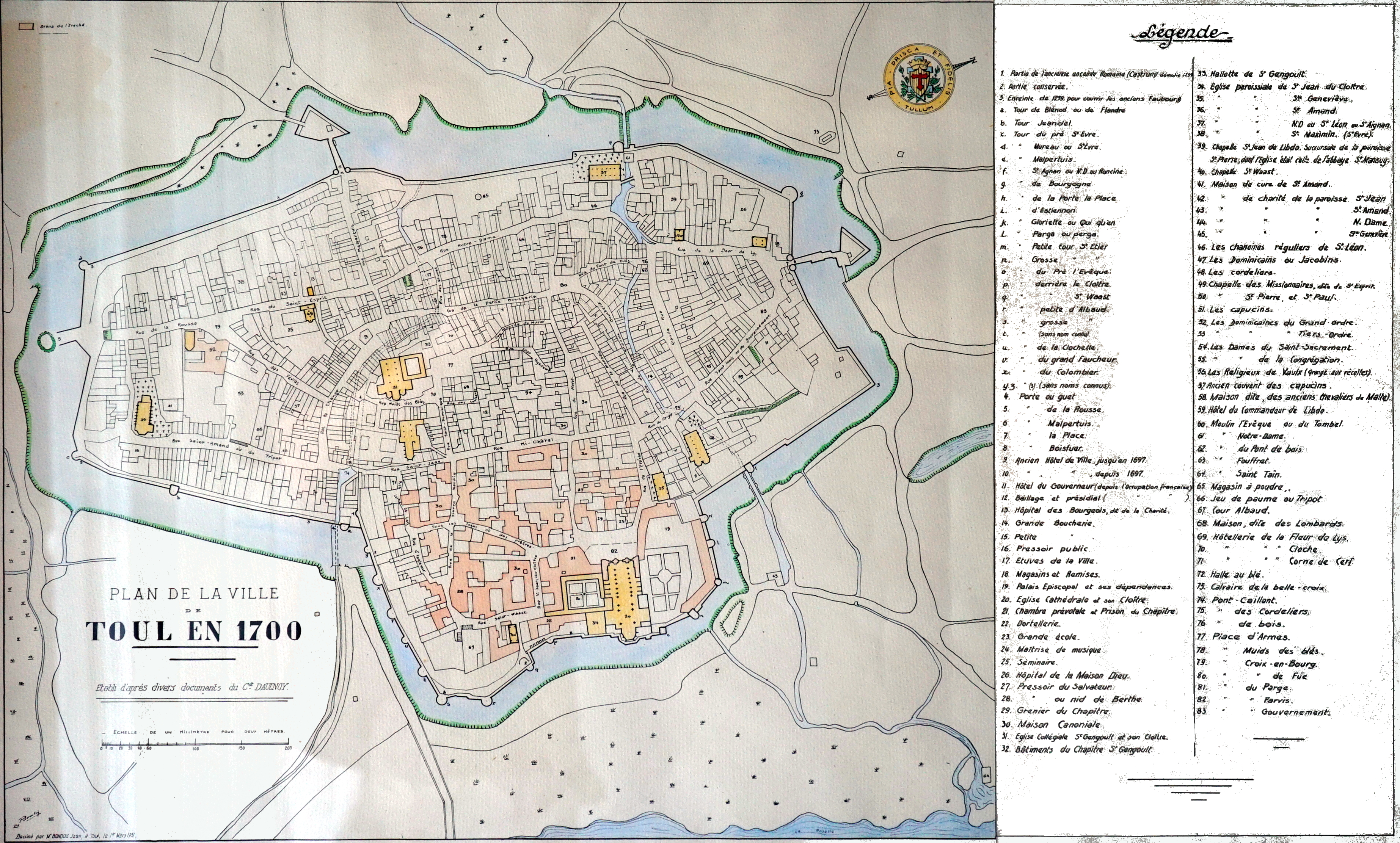 présenté au musée de Toul.